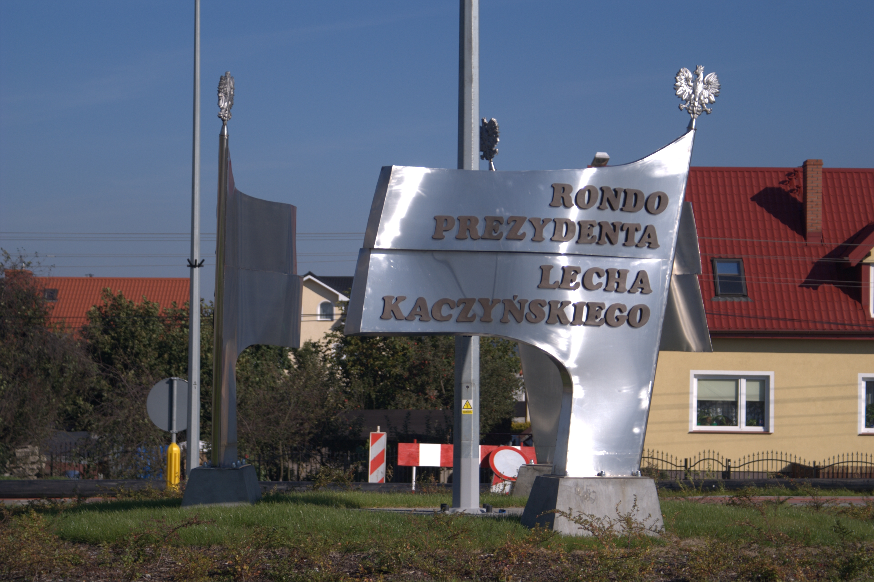 Rondo Prezydenta Lecha Kaczyńskiego w Rumi u zbiegu ulic Gdańskiej i Dębogórskiej. Nazwane i poświęcone 8 sierpnia 2010r, w czasie obchodów 30 rocznicy powstania NSZZ „Solidarność”. Autorami projektu pomnika są Eugeniusz Lademann i Zdzisław Koseba, a wykonawcą Jarosław Kowalski.